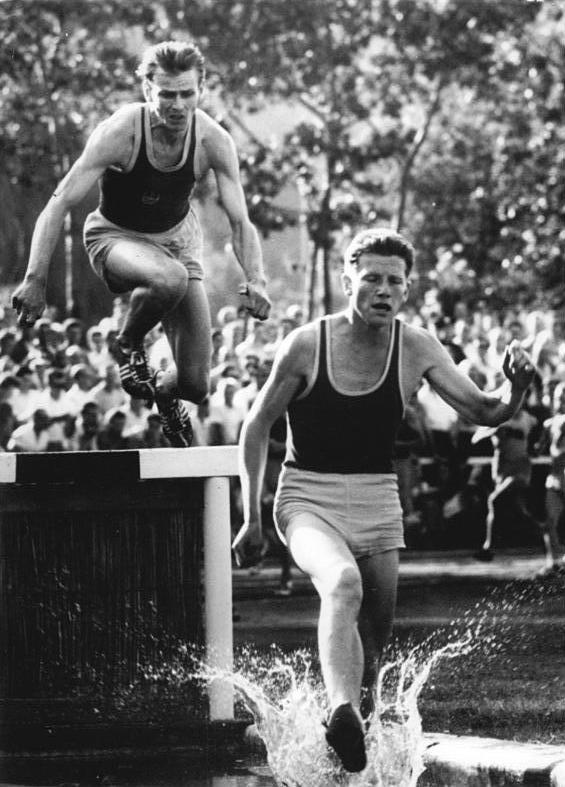 Herrmann Buhl, Fred Dörin Zentralbild Wlocka-Wittig Wen-L Deutsche Leichtathletik-Meisterschaften vom 18. - 20.7.1958 in Jena UBz: Im 3000 m-Hindernislauf siegte Herrmann Buhl (vorne) vor Fred Döring.